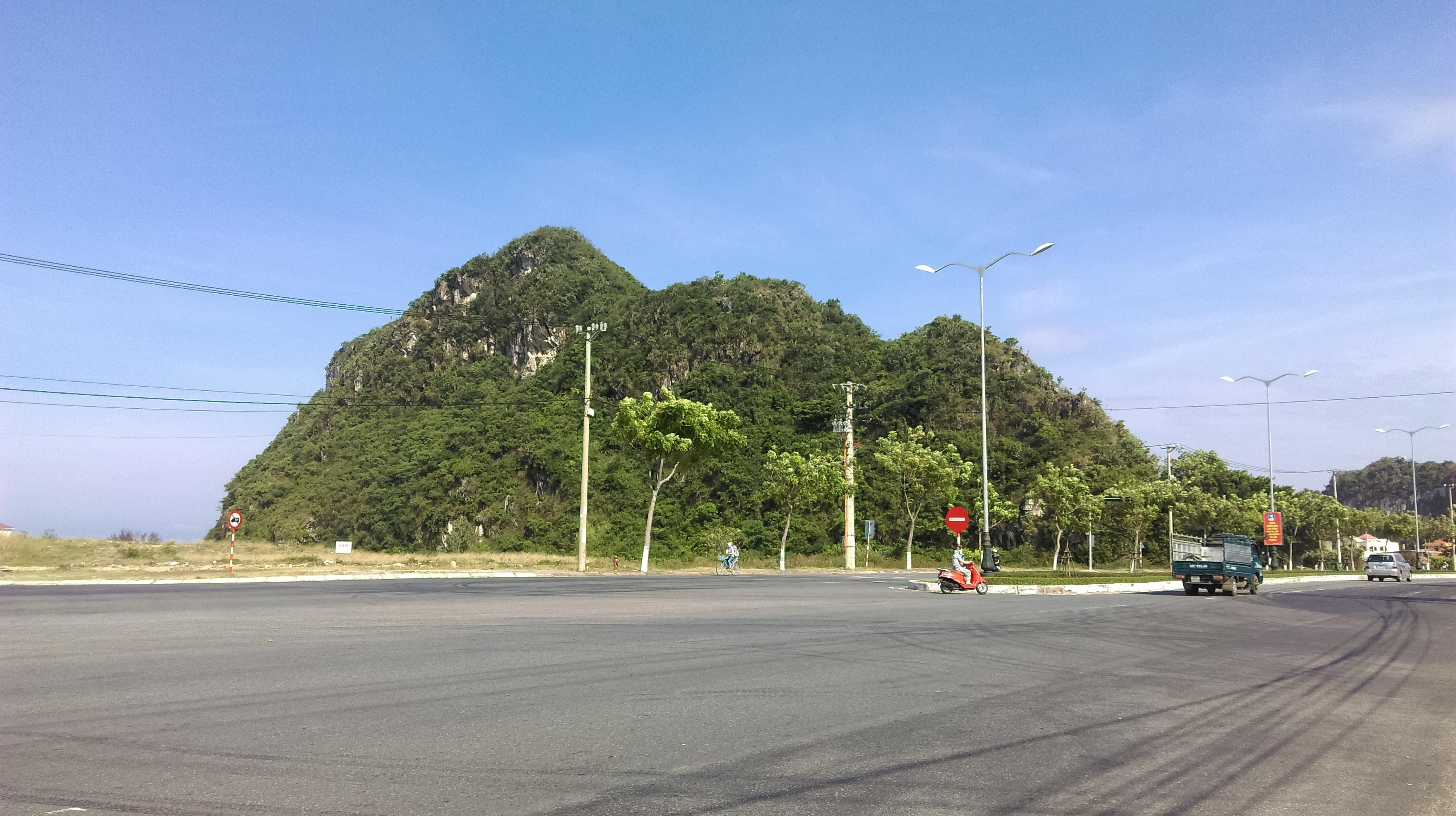 Thủy sơn, Ngũ Hành Sơn, Đà Nẵng